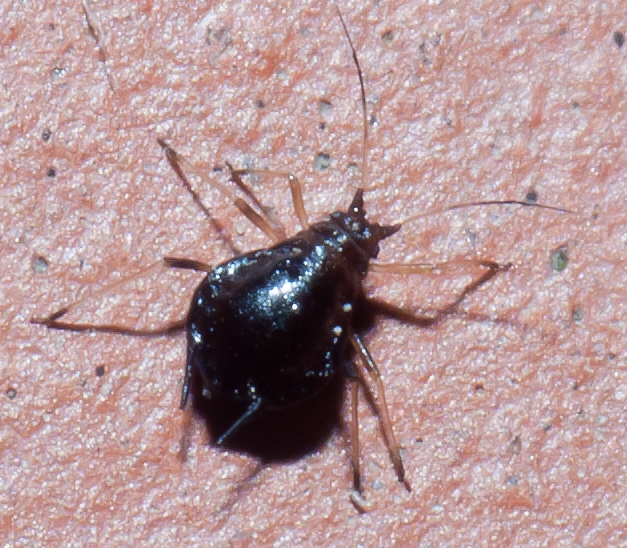 Myzus cerasi en Bastavales, Brión, Galicia